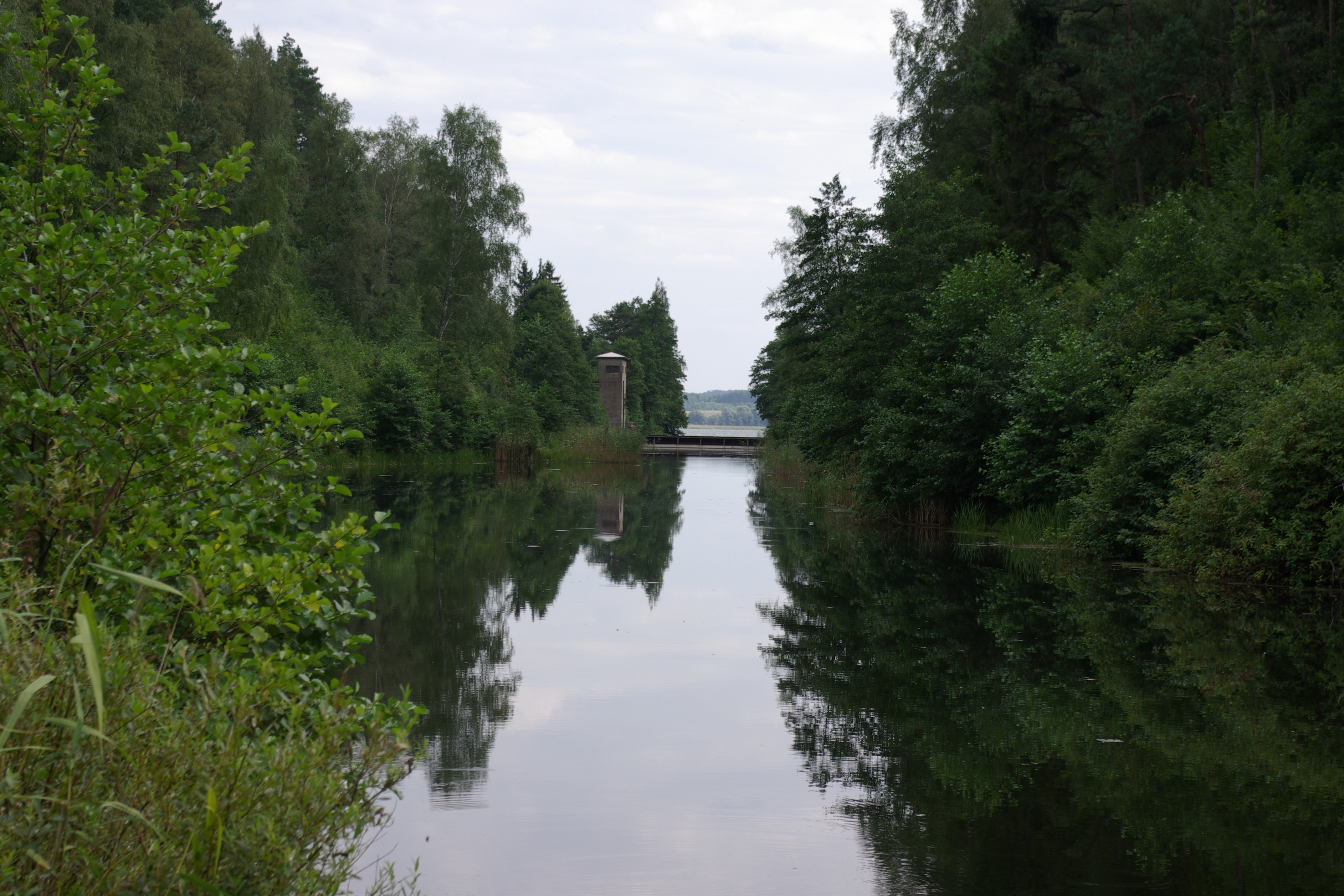 Kanał Mazurski, Jaz walcowy Piaski (Guja)